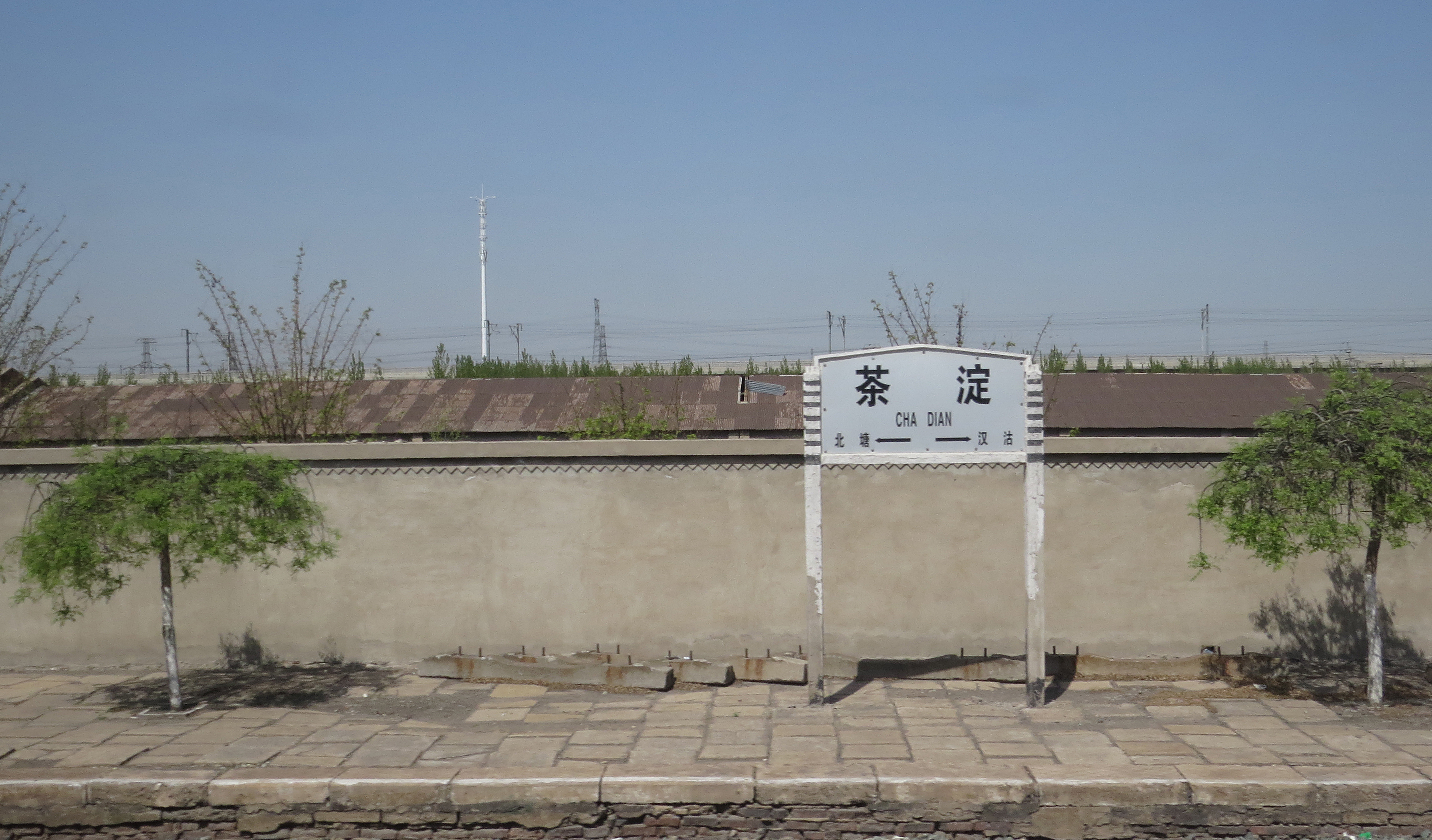 茶淀站站牌